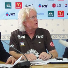 Winnie Schaefer